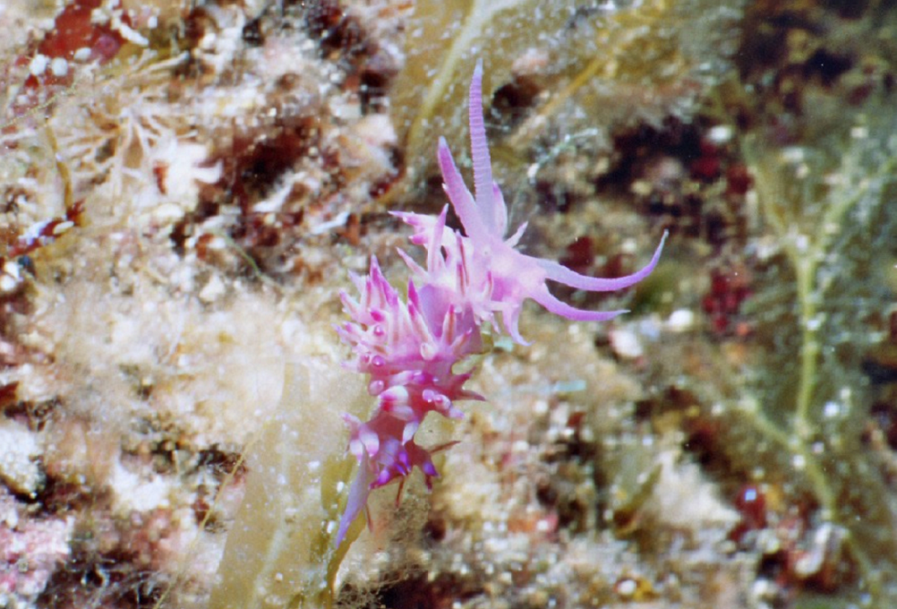 Flabellina